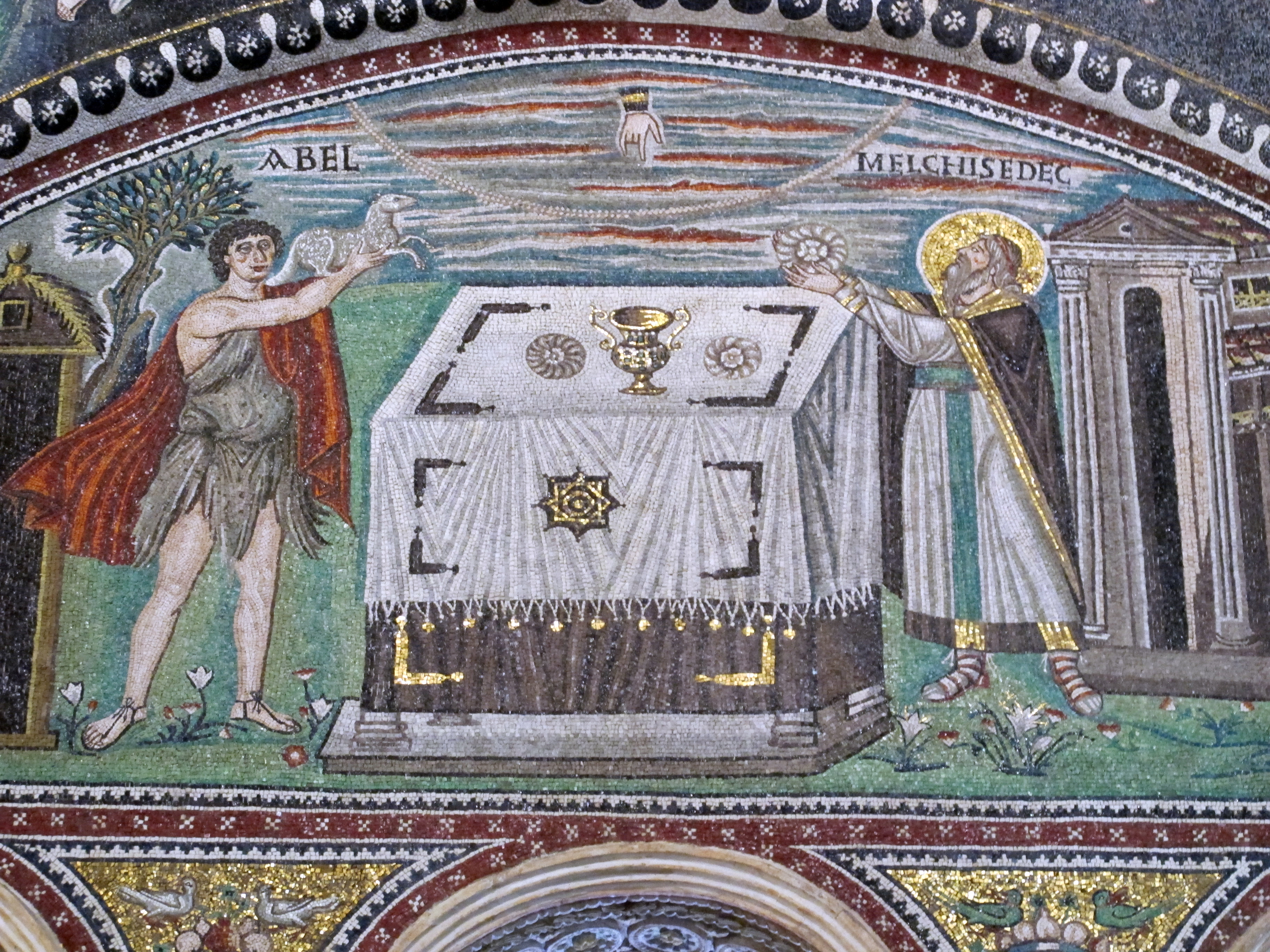 Basilica di San Vitale - MIBAC This is a photo of a monument which is part of cultural heritage of Italy.